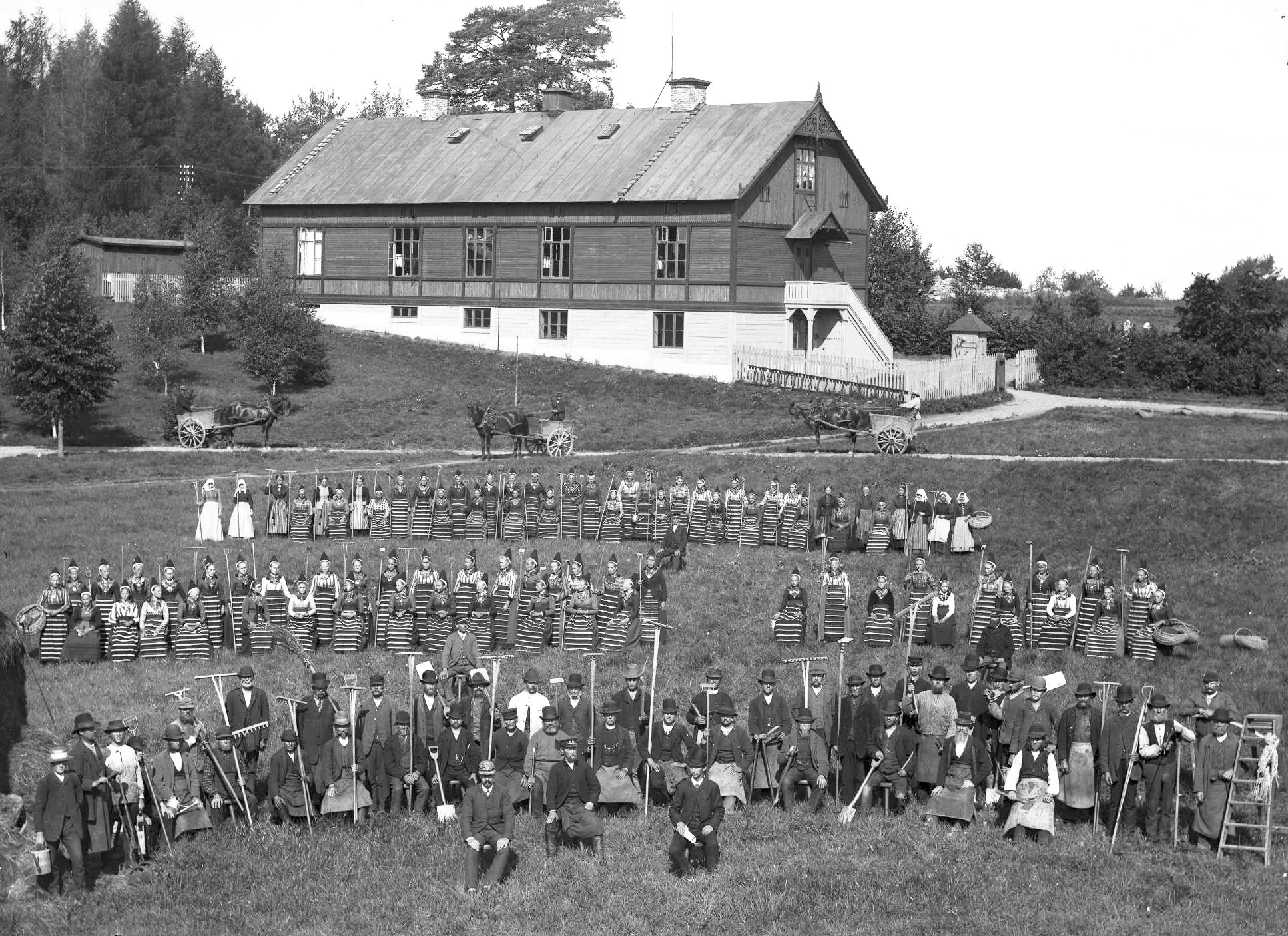 Depicted place: Uppland, Stockholm, Solna, Solna, Haga norra kyrkogård (Sverige (SE))